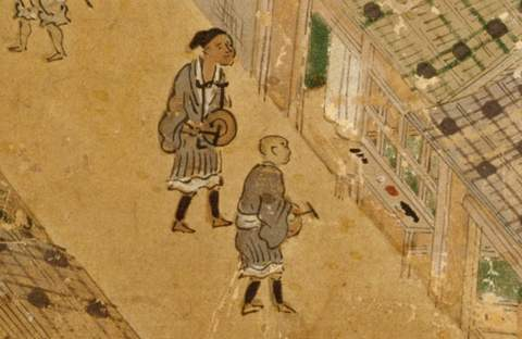 洛中洛外図屏風、狩野元信、1520年代